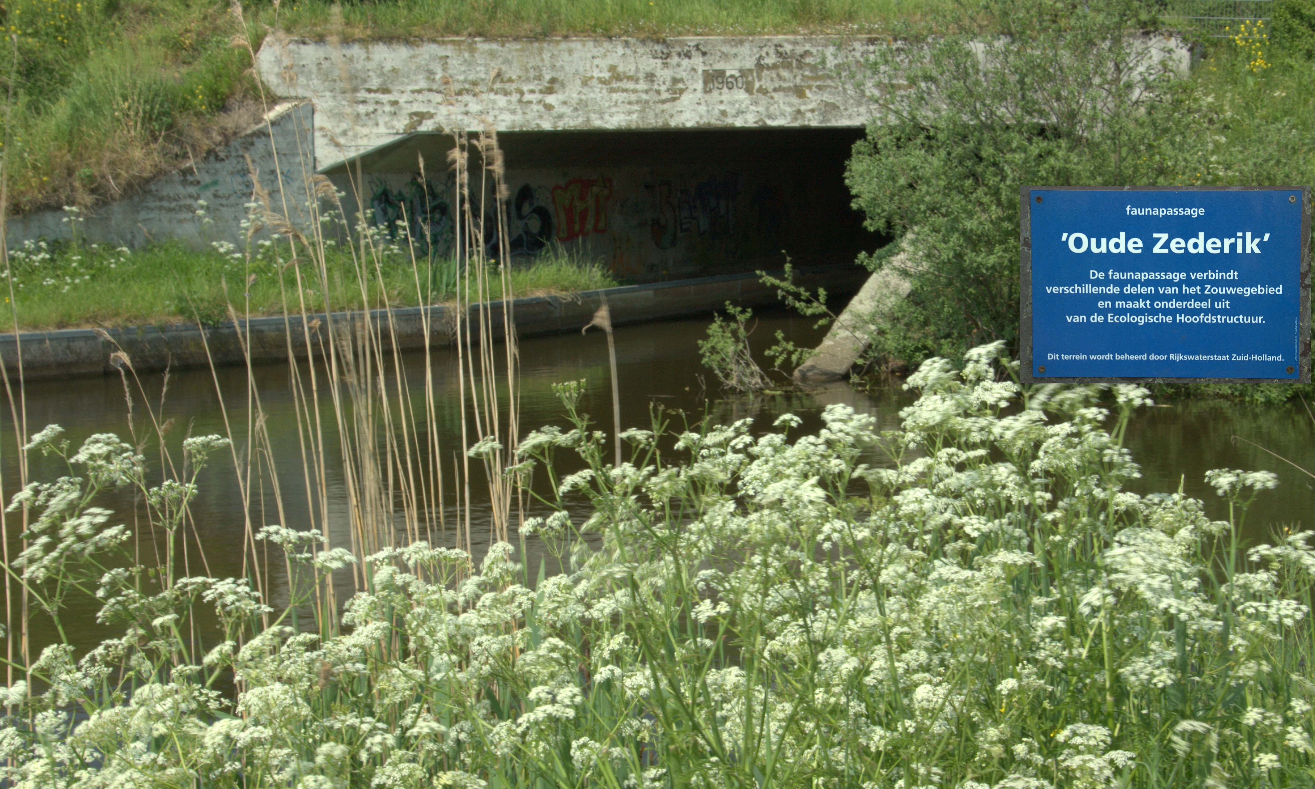 De Faunapassage in de Nieuwe Zederik bij Meerkerk onderdeel van de Ecologische Hoofdstructuur.